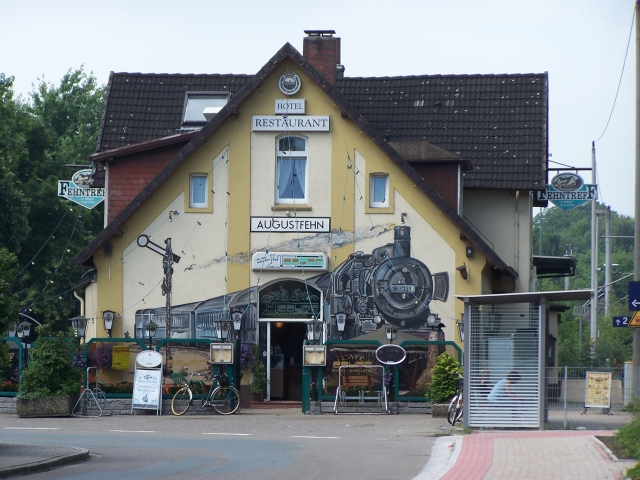 Bahnhof Augustfehn 28.07.2005